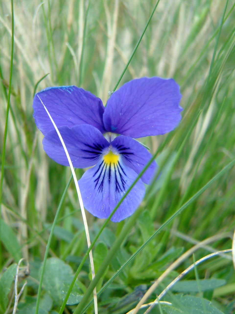 Galmeiveilchen (Viola guestphalica) Fundort: Bleikuhlen bei Blankenrode/Deutschland; ehemaliger Blei-Zink-Abbau am Westheimer Abbruch; Standorttypische Vegetation